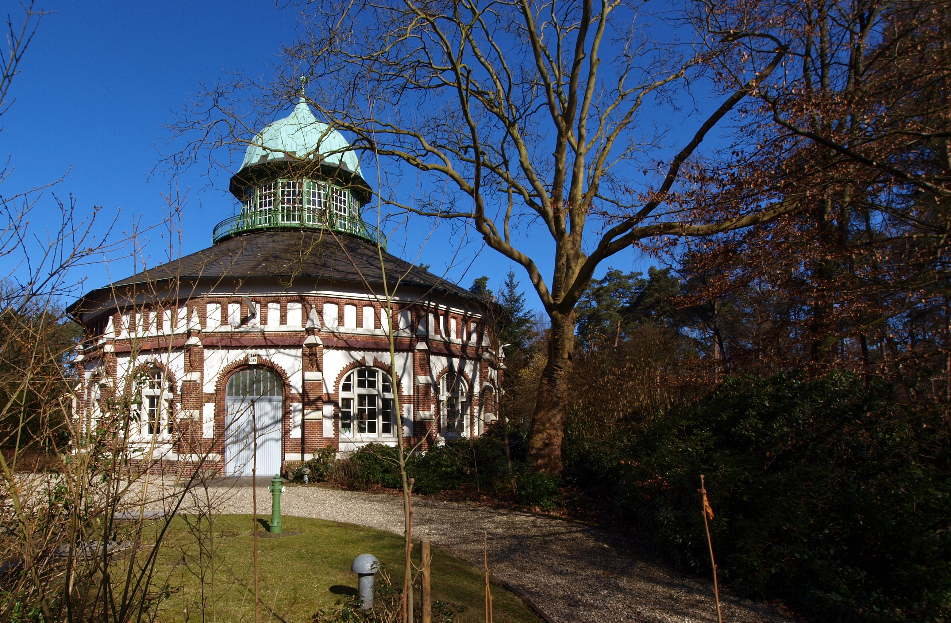 Wasserwerk Hohe Ward Object location51° 52′ 52.58″ N, 7° 40′ 50.42″ E